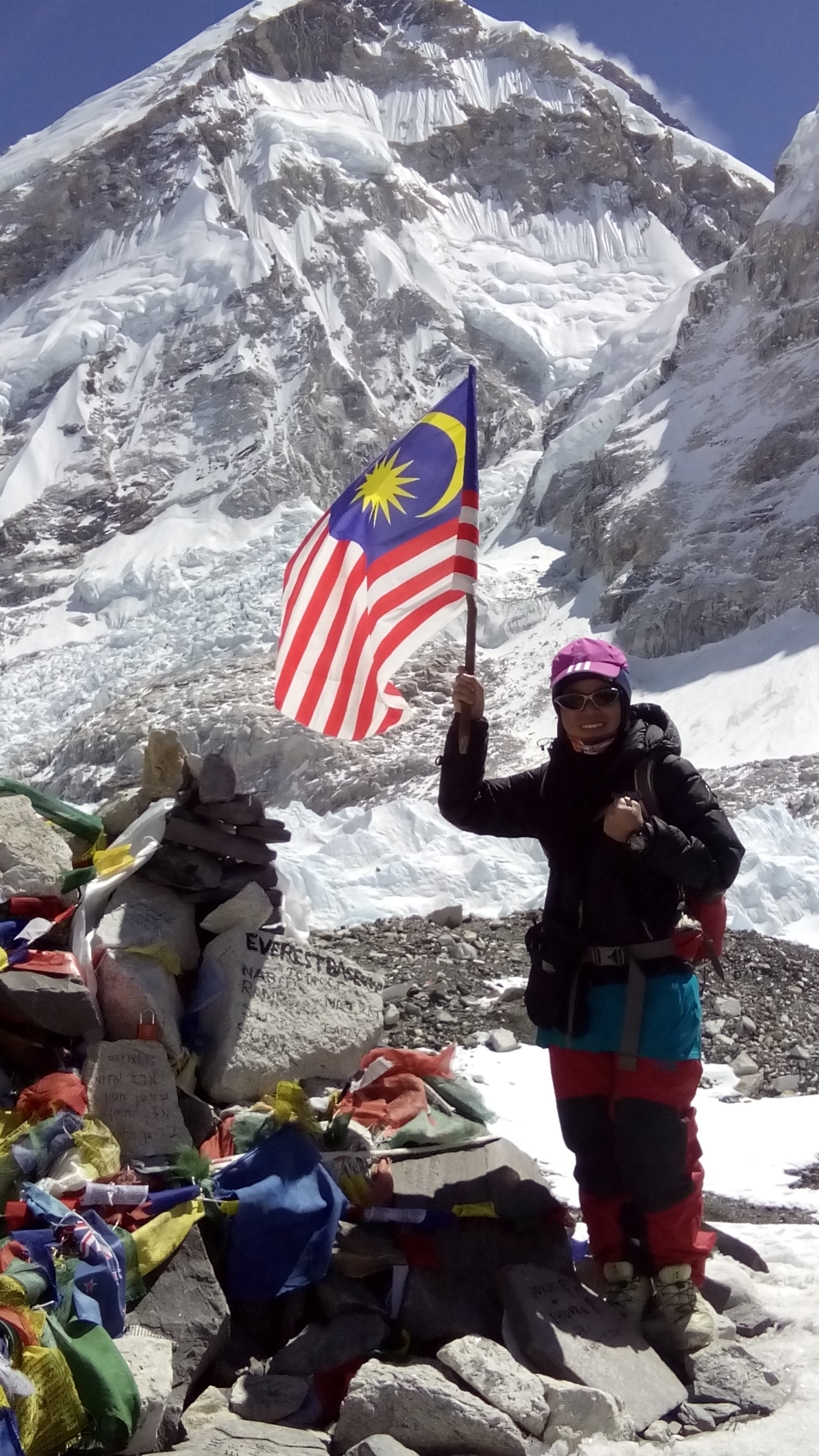 Ummu Farah Haidar Binti Zulkifli dilahirkan di Negeri Sembilan serta dibesarkan di Terengganu dalam sebuah keluarga konservatif. Namun itu tidak menghalang beliau dari menyertai sukan dan aktiviti lasak sejak kecil. Kepimpinan dan sifatnya melayakkan beliau untuk dipilih menjadi Presiden Renjer Puteri Daerah serta pernah mewakili negeri Terengganu dalam sukan silat olahraga. Penglibatan dalam sukan lasak seperti mendaki menjadi lebih giat ketika Ummu berada dalam pengajian sarjana muda di Universiti Islam Antarabangsa Malaysia. Selain dari itu beliau turut aktif dalam khidmat sebagai Askar Wataniah dan juga aktiviti amal. Kerjaya sebagai peguam dan juga pengajian Sarjana Undang-Undang tidak menghalang beliau untuk terus melakukan aktiviti lasak. Semangat dan kebolehan yang pelbagai antara faktor dalam pemilihan beliau sebagai pembantu ketua ekspedisi dalam Misi Pendakian Amal ke Kem Dasar Everest 2015 yang dianjurkan oleh Yayasan Kemanusiaan Muslim Aid Malaysia dengan kerjasama Persatuan Kembara Negara dan MY Team. Pada 2017, setelah penubuhan Kempen Kembara Srikandi Prihatin, sebuah projek amal oleh Persatuan Kembara Negara dengan kerjasama Negaraku dan juga disertai oleh pendaki dari Puteri UMNO Malaysia, beliau dipertanggungjawabkan untuk menggalas jawatan sebagai Pengarah Projek. Beliau merupakan salah seorang pendaki Kembara Srikandi Prihatin yang telah mengharung cuaca ekstrim di Wilayah Caucasus bagi mengibarkan Jalur Gemilang sempena kemerdekaan negara Malaysia yang ke-60. Kejayaan beliau merupakan hadiah bermakna kepada rakyat Malaysia setelah mengharung pelbagai cabaran semasa berada di negara Russia. Kempen Kembara Srikandi Prihatin mengibaratkan pendakian gunung sebagai perjuangan dalam mengatasi pelbagai isu dan masalah yang melanda hidup disamping memperkasakan wanita melalui sukan lasak.